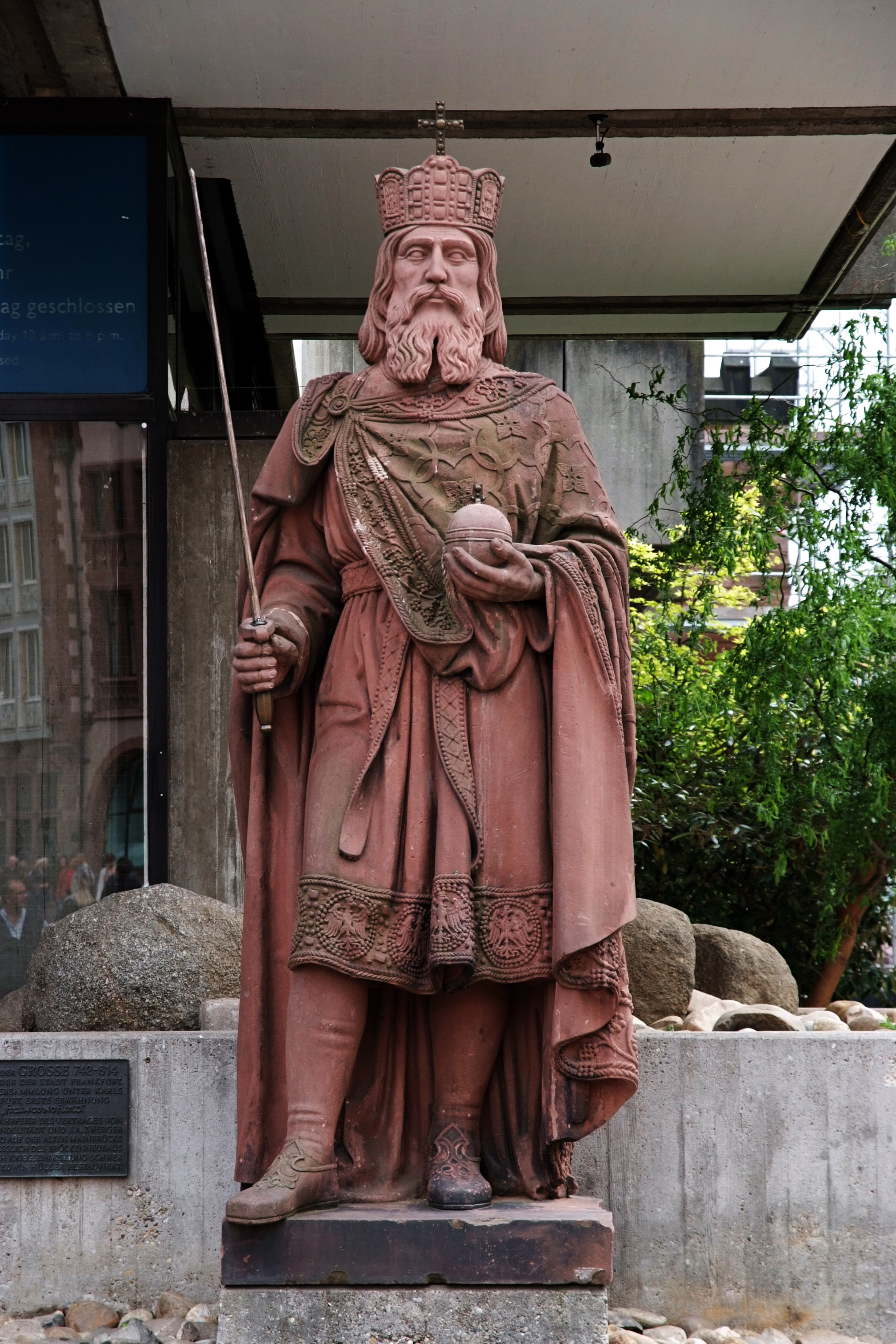 Statue Karls des Großen vor dem Eingang des Historischen Museums Frankfurt am Main, von Johann Nepomuk Zwerger